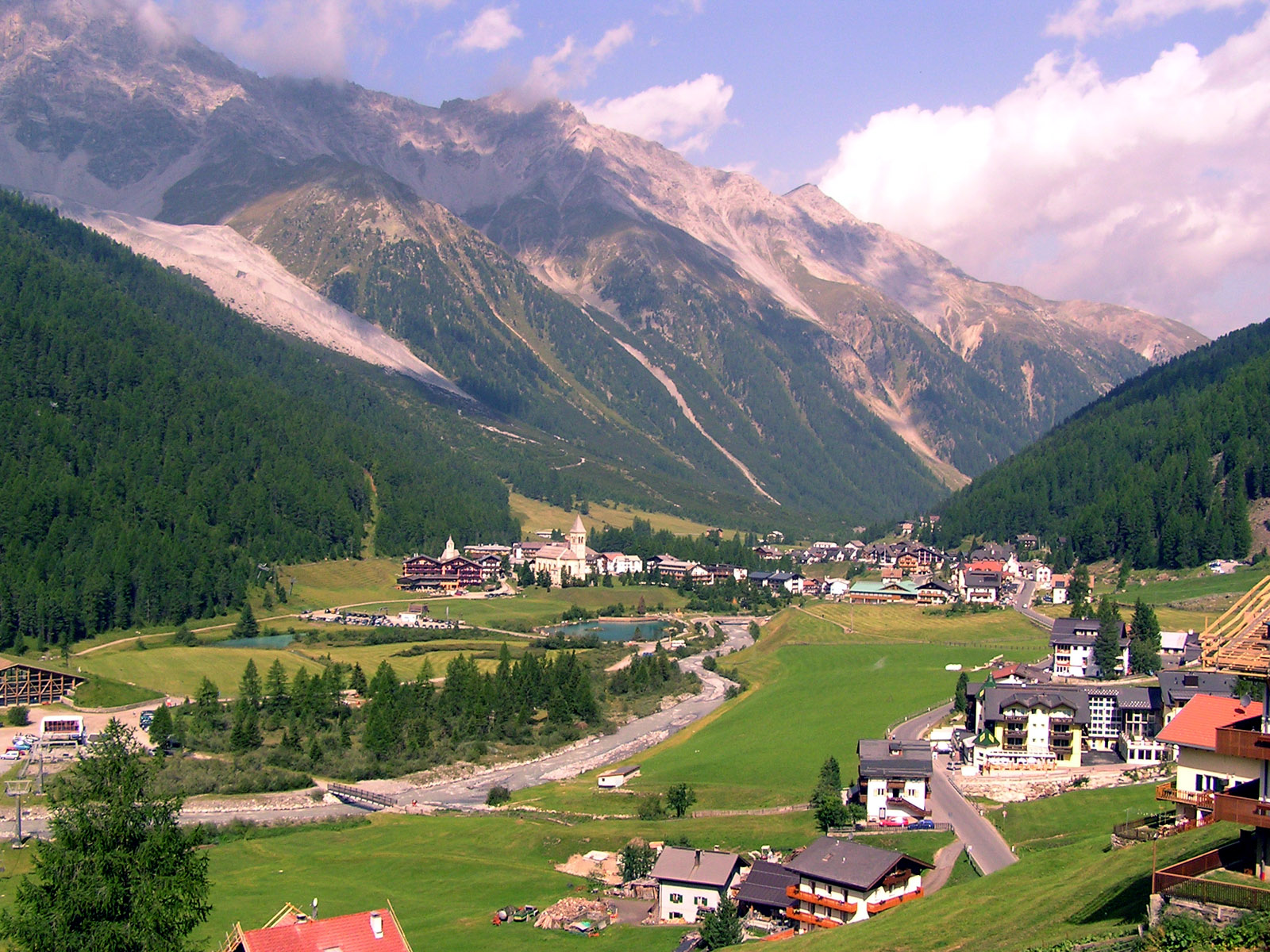 Sulden, Ortsteil von Stilfs